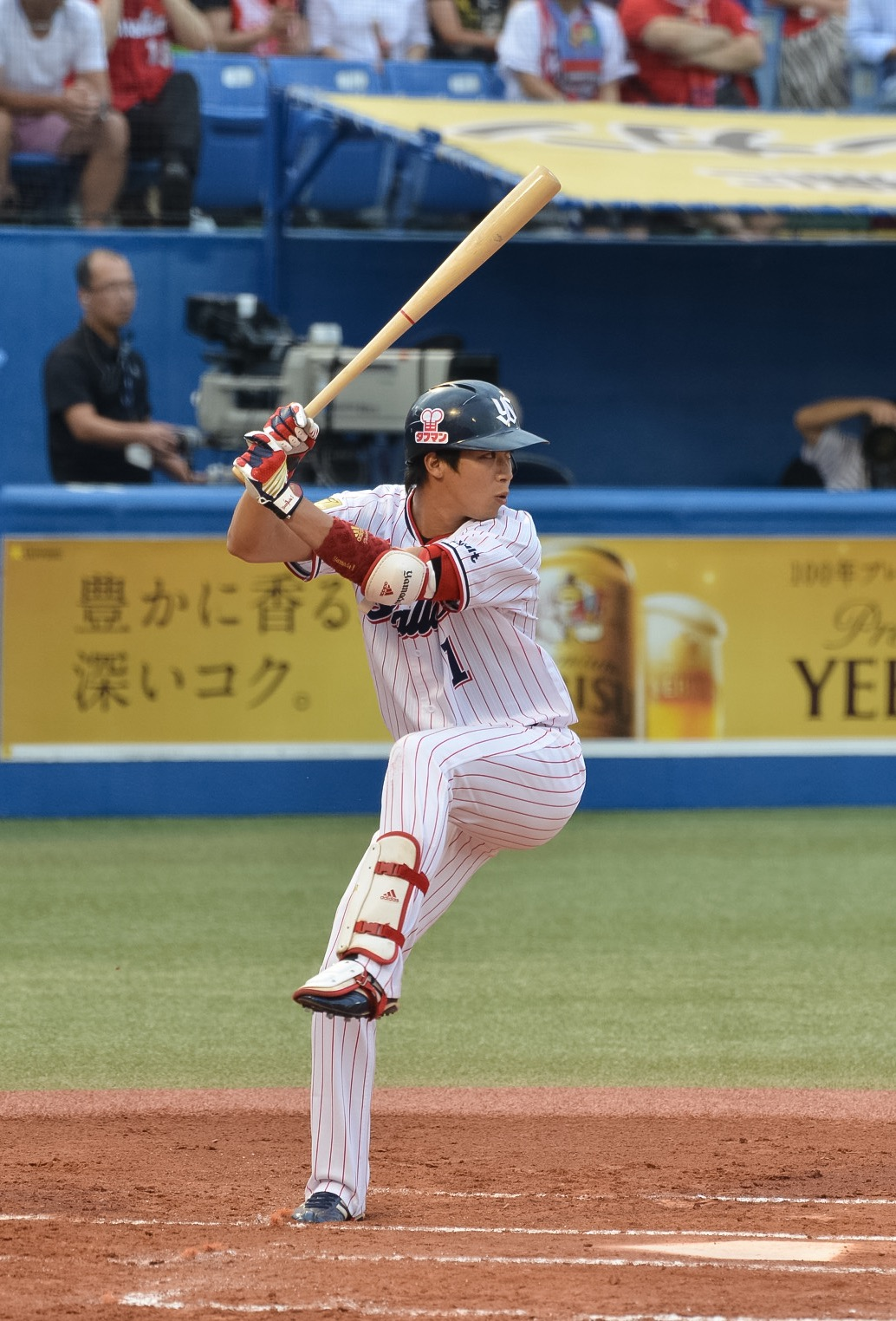 東京ヤクルトスワローズ 山田哲人 2016年9月3日 神宮球場